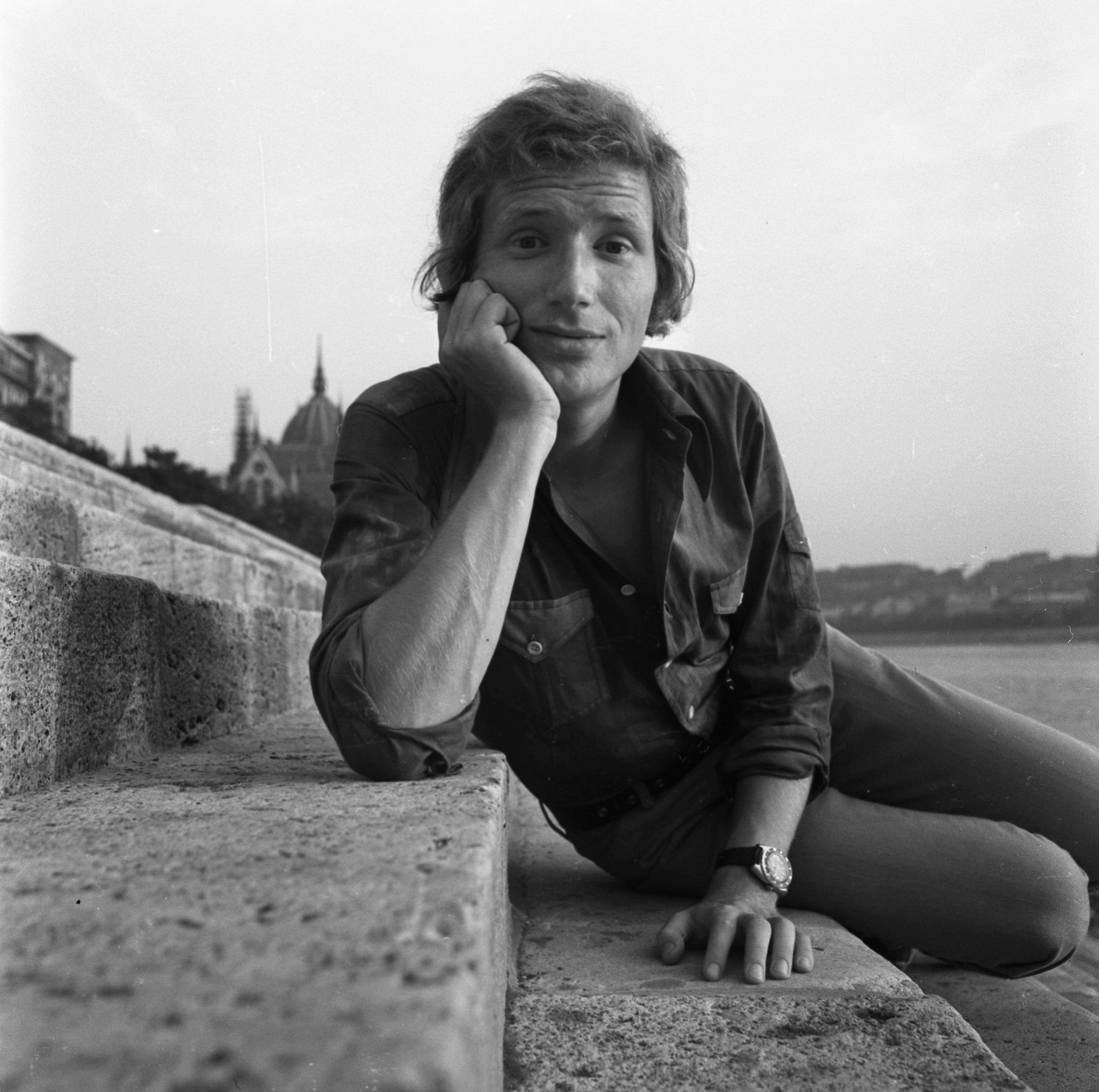 Kern András színművész a pesti alsó rakpart lépcsőin, háttérben a Parlament.